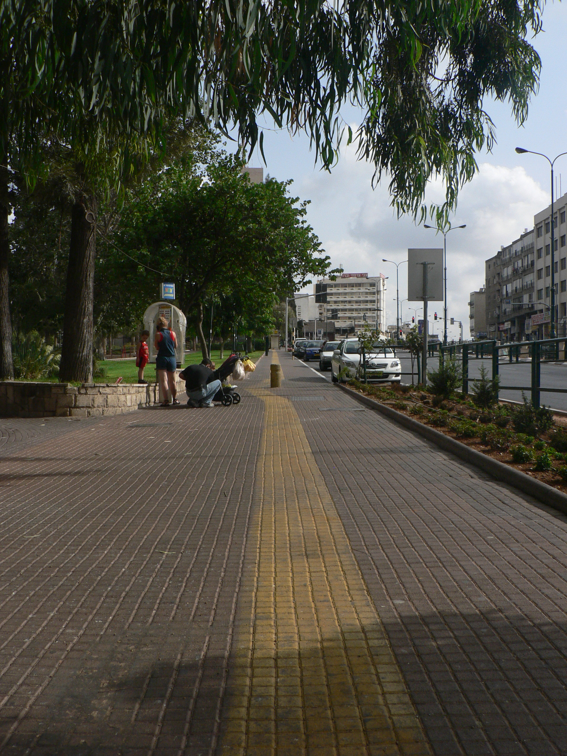 Rishon LeZion - HaRishonim's Road ("The Yellow Road") segement in Herzl street ראשון לציון - שביל הראשונים (השביל הצהוב), הקטע ברחוב הרצל